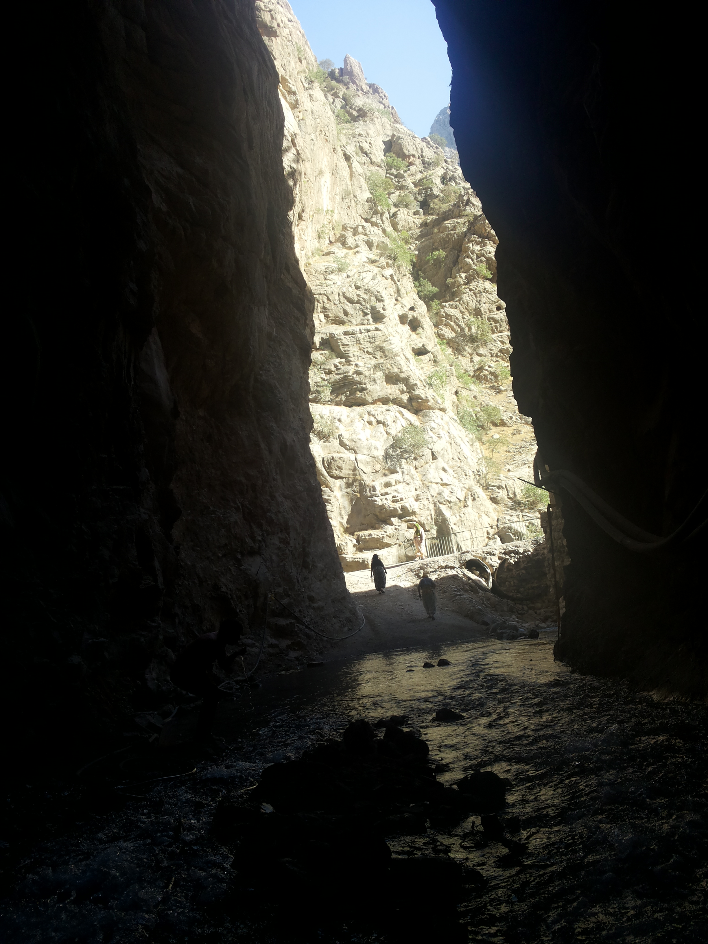 کوردی: دەروازەکەی کانی بڵ